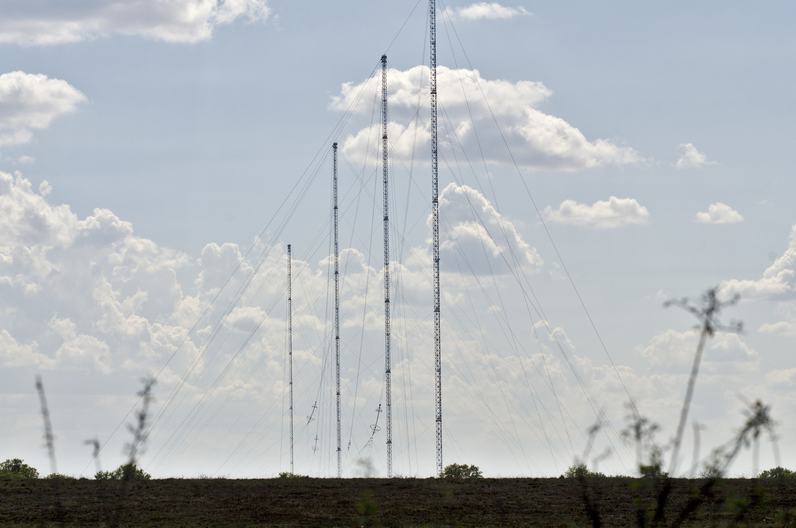 Antennes du Centre de transmissions de la Marine nationale de Rosnay